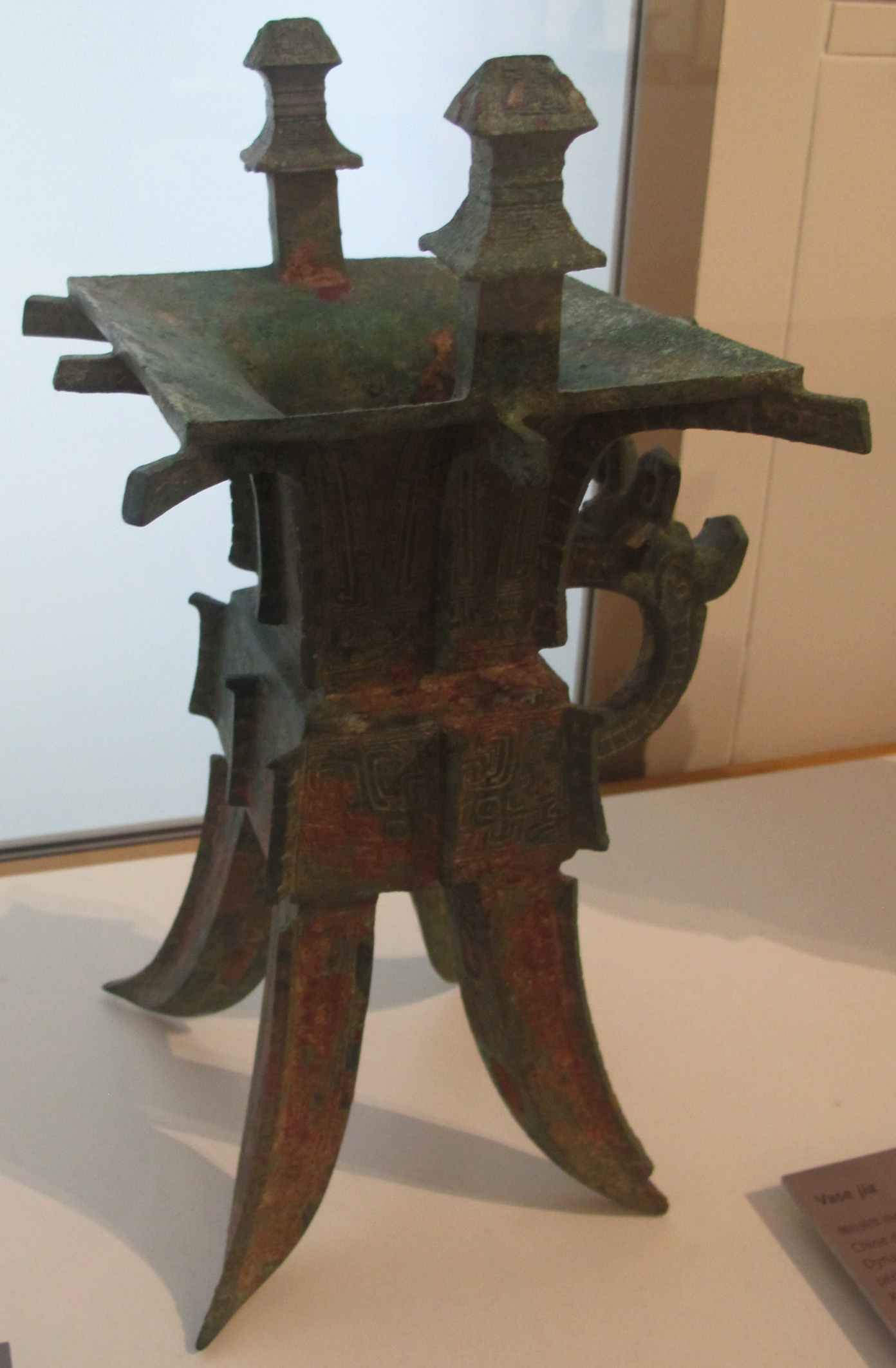 Dinastia shang, coppa tetrapode fangja, cina del nord, xiii-xii sec. ac.